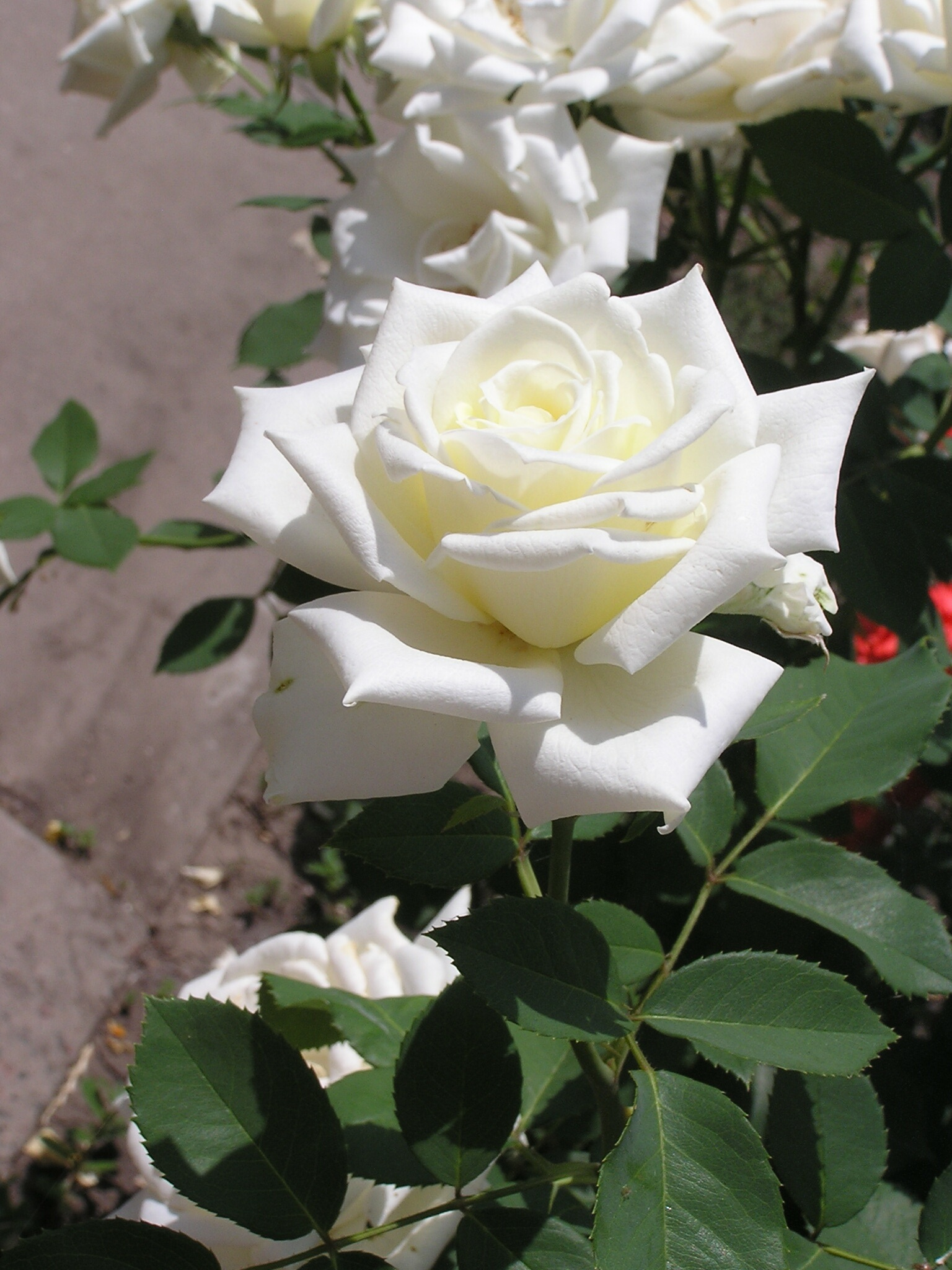 Растение в Седово.